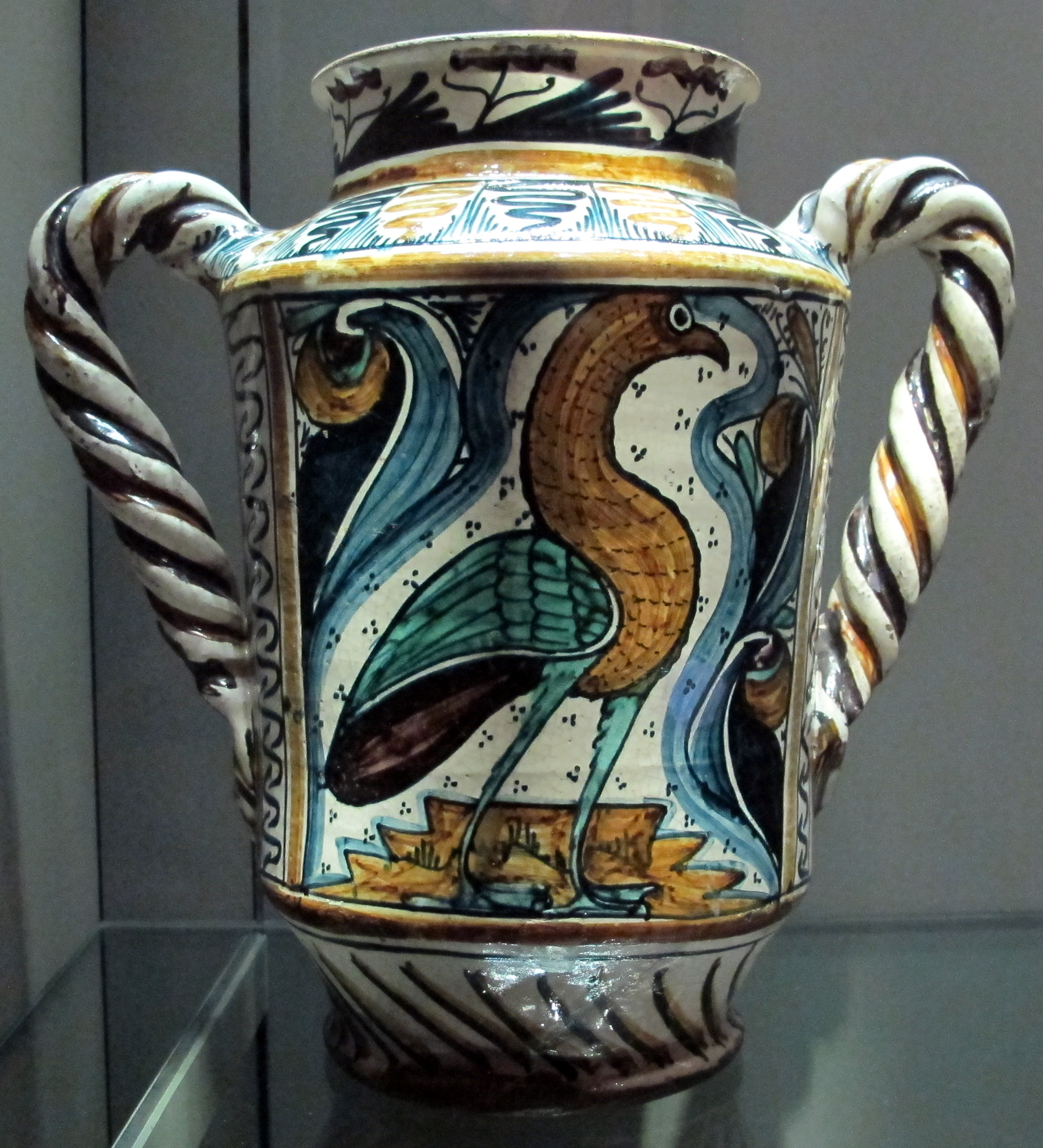 Maiolica al Louvre, Parigi